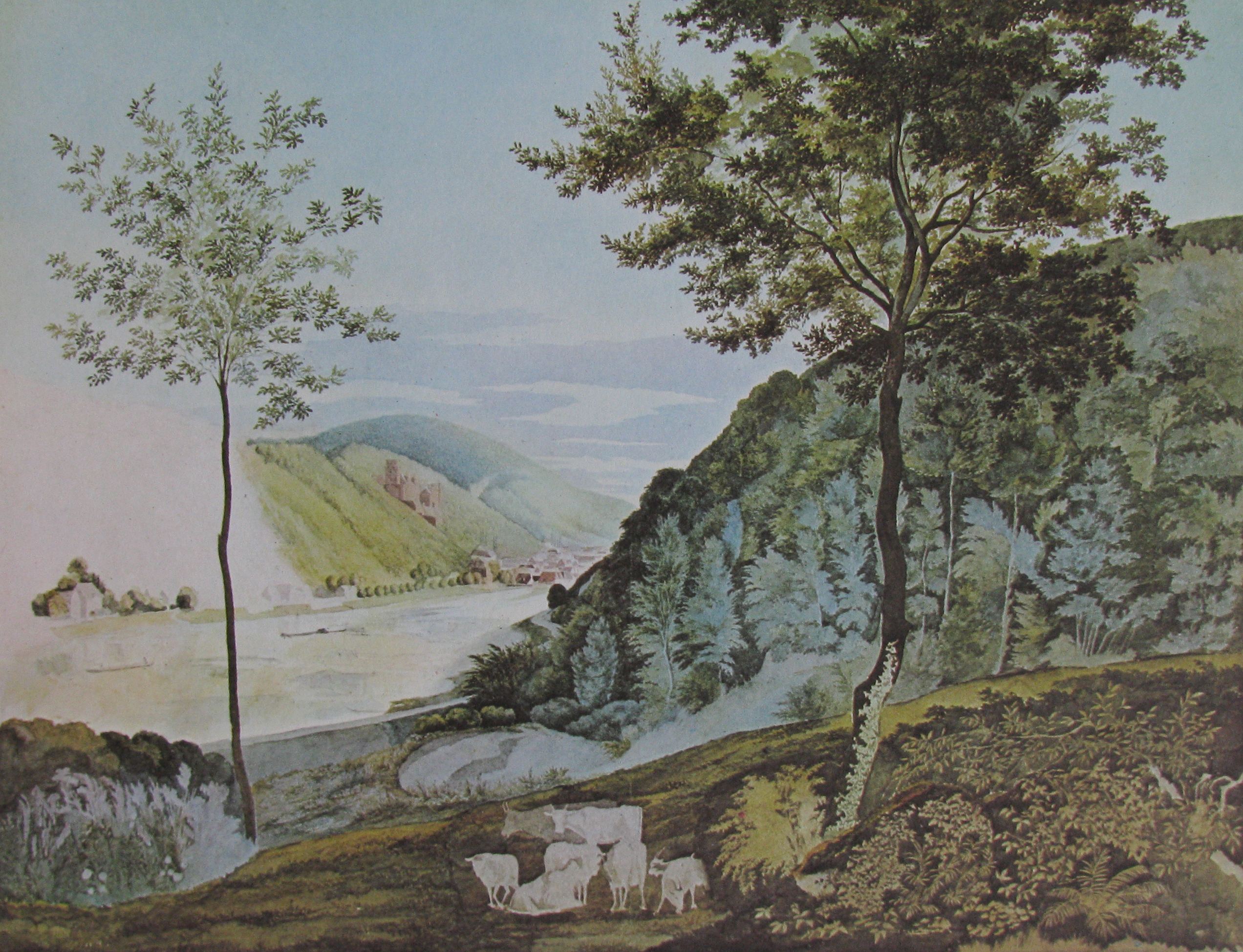 Heidelberg/Deutschland, vom Haarlass aus gesehen